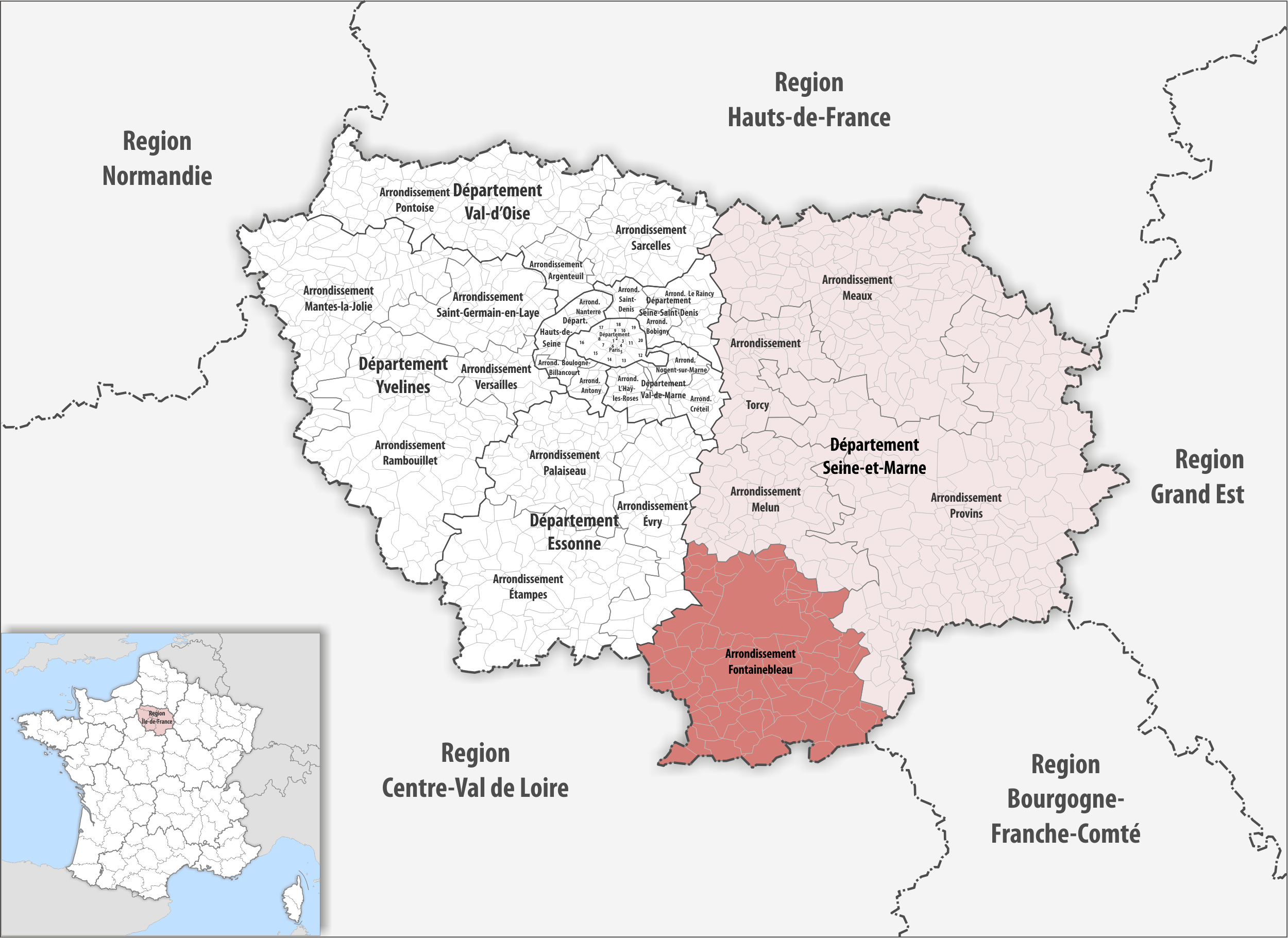 Lage des Arrondissements Fontainebleau